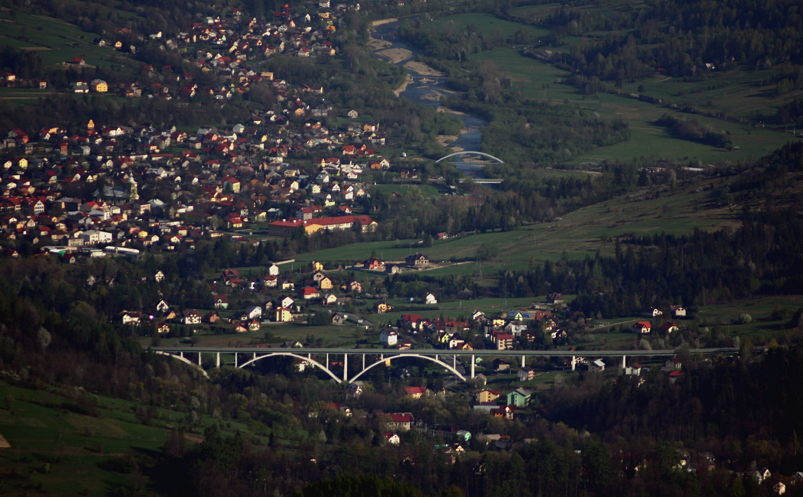 Panorama Milówki widziana z wieży widokowej na Baraniej Górze